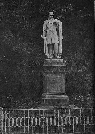 Pomnik Józefa Korzeniowskiego w Brodach, położony na skraju ogrodu miejskiego zwanego "Rojekówka".